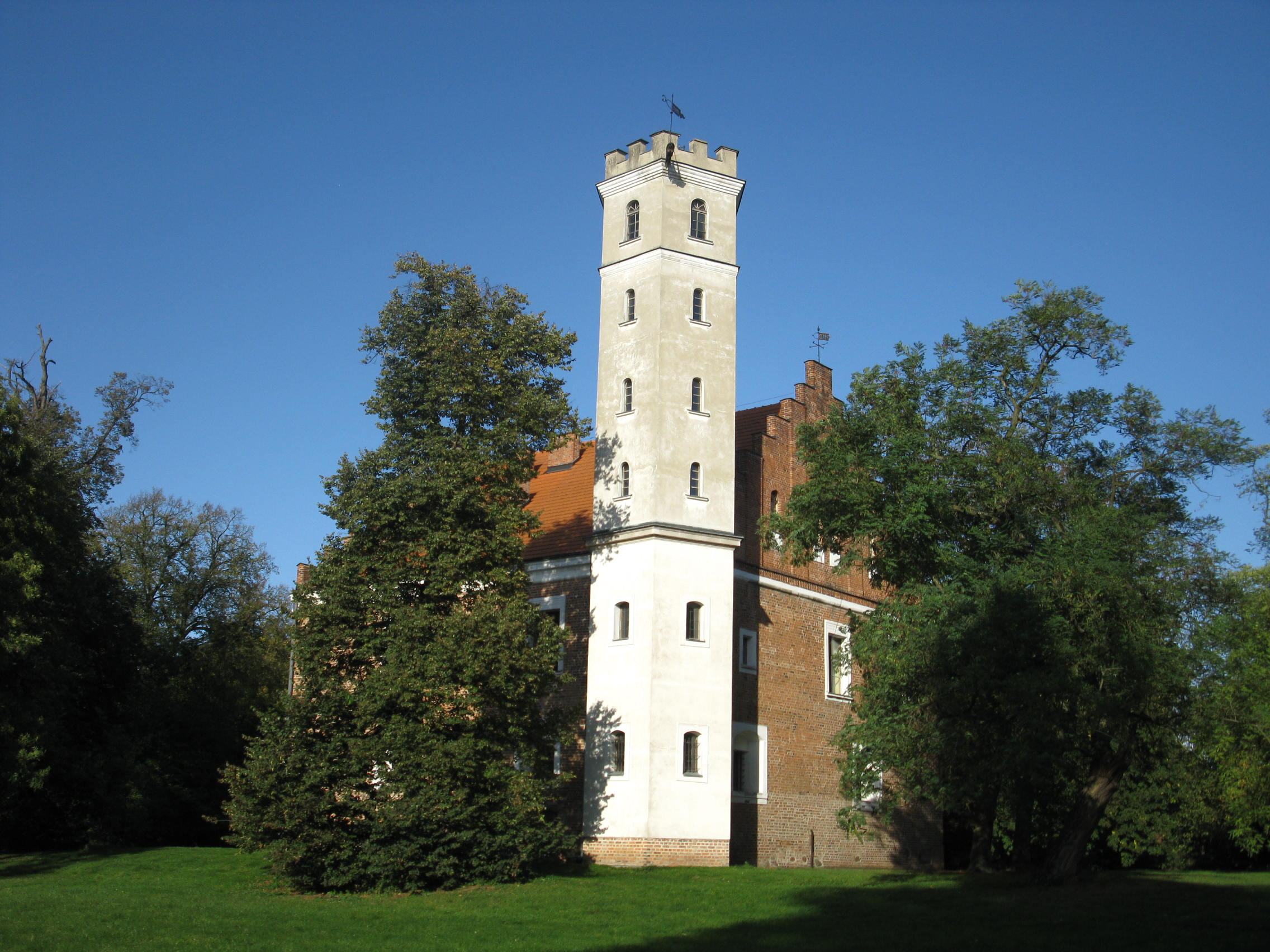 Grocholin - zespół pałacowy: dwór obronny, pocz. XVII, 1863, 1 poł. XIX